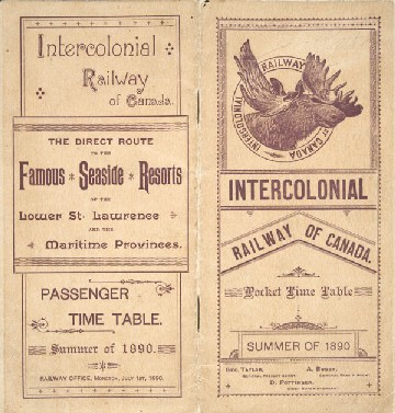 Couverture de l'horaire des trains du chemin de fer Intercolonial.